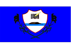 A Bandeira de Balsas foi idealizada pela irmã Capuchinha Luiza Rodrigues da Costa, foi criada em 31 de julho de 1972. Significado: Livro e Pena - simboliza a cultura balsense; A Balsa – simboliza a origem do seu nome; Os cachos de arroz – simbolizam sua riqueza natural.